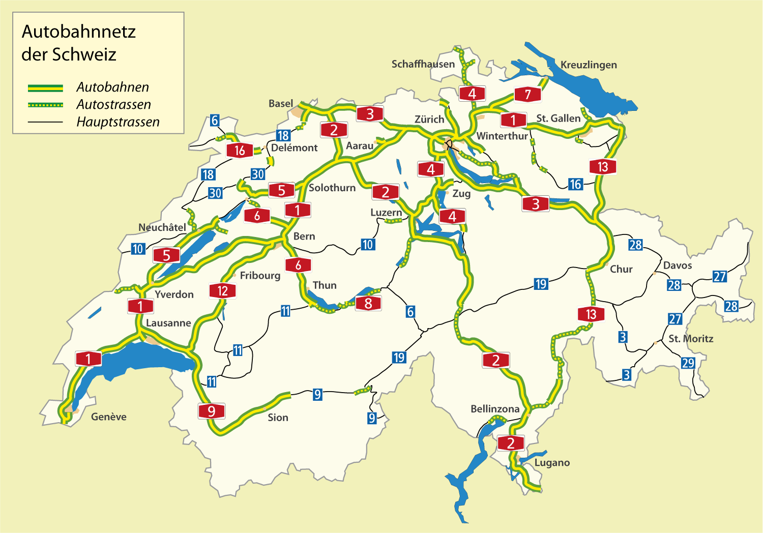 Autobahnnetz Schweiz